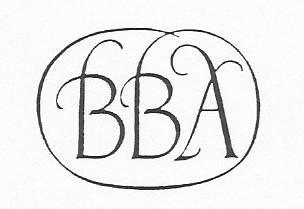 Logo des Berliner Bibliophilen Abends, ältere Version